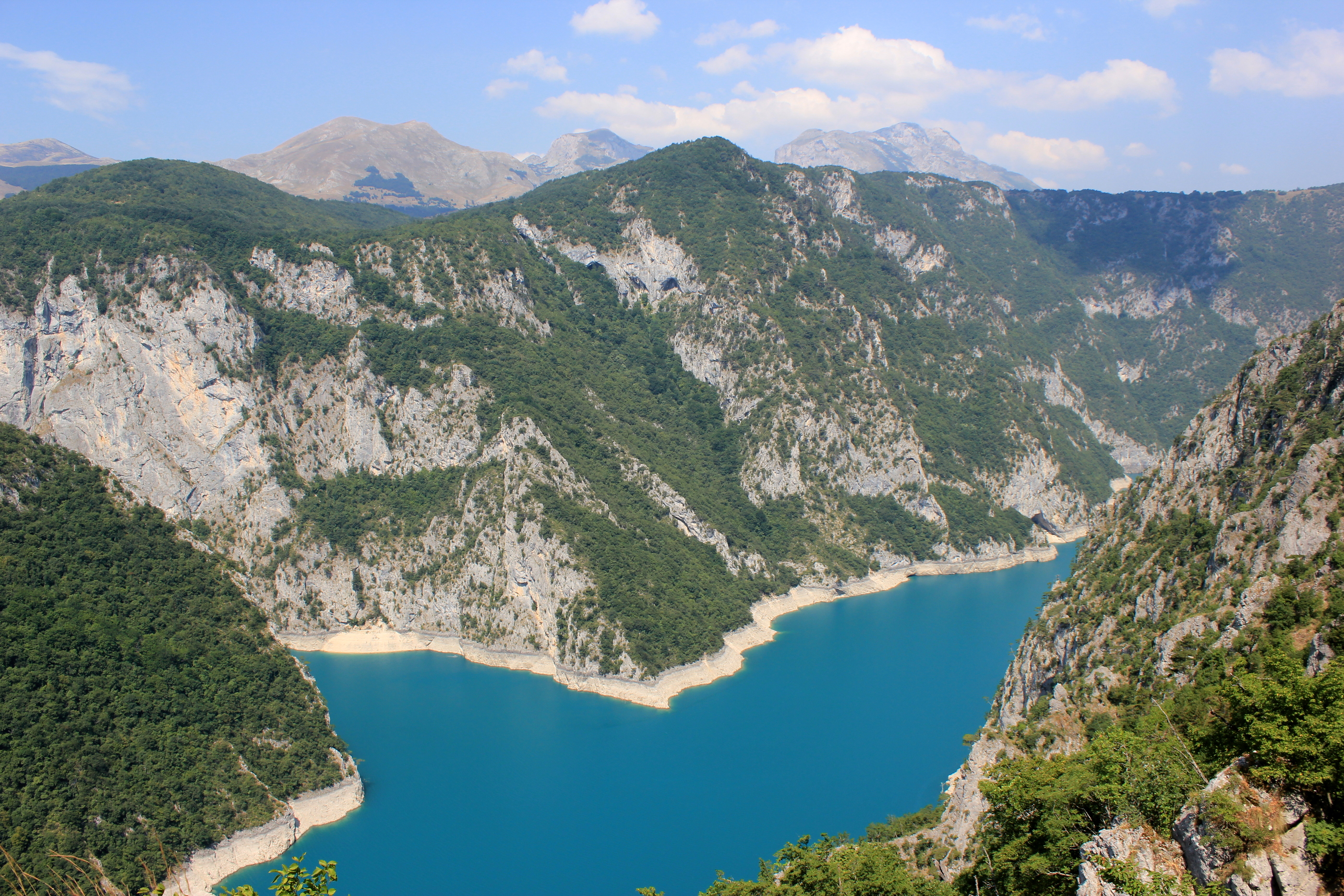 Blick auf den Piva-Stausee bei Plužine, Montenegro.Hornjoserbsce: Spjaty jězor Piwy pola Plužine na sewjerozapadźe Čorneje hory.